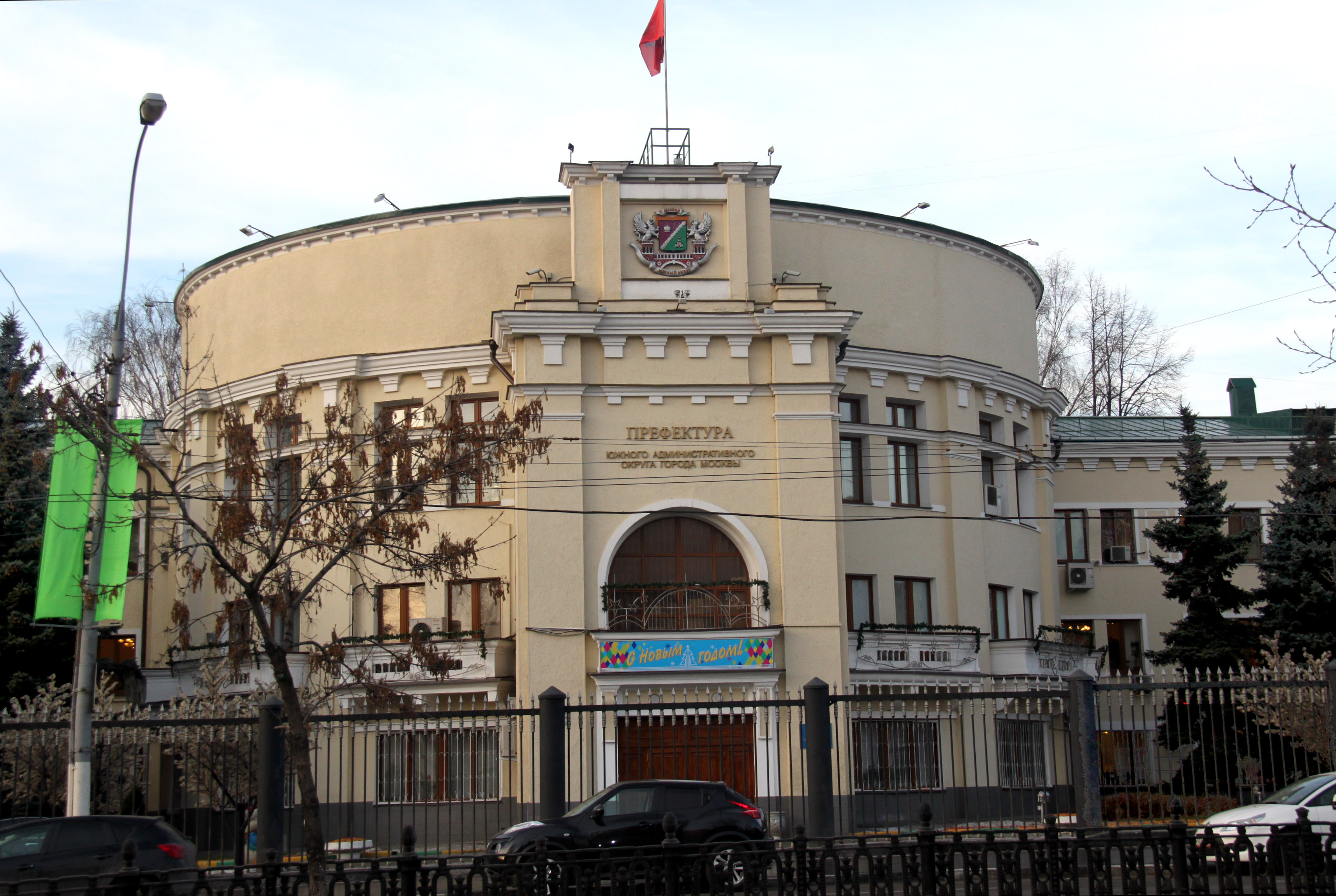 Префектура Южного административного округа города Москвы